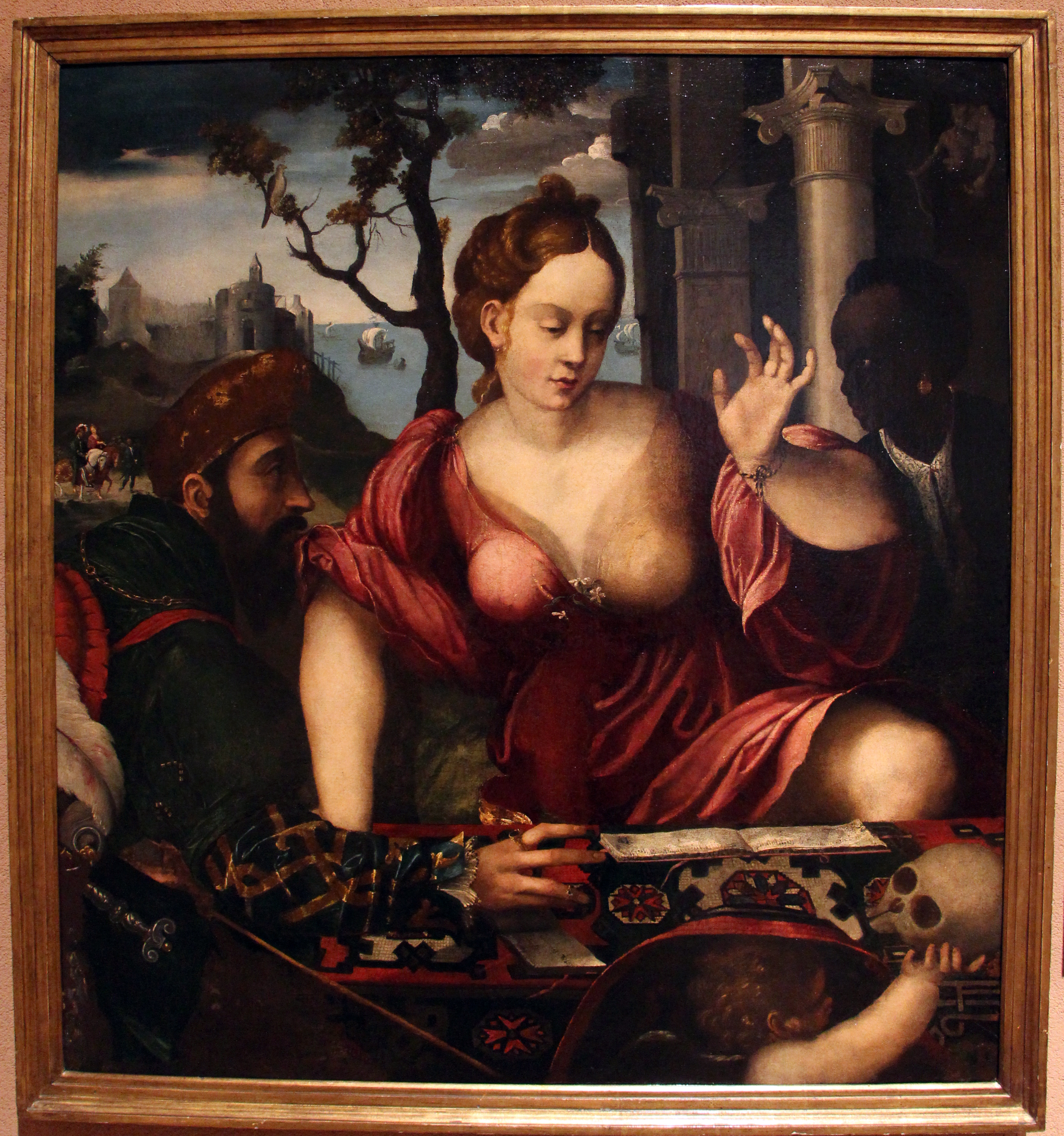 Museo Poldi Pezzoli (Milano)